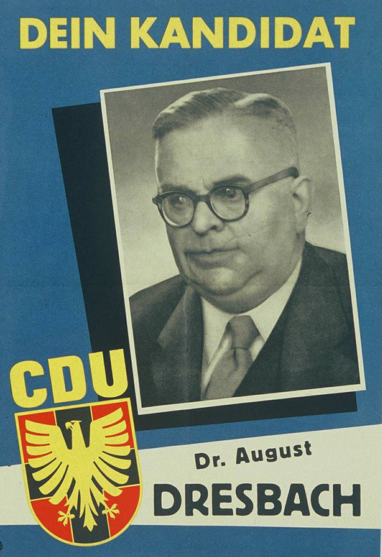 Dein KandidatAbbildung:PorträtfotoPlakatart:Kandidaten-/Personenplakat mit PorträtObjekt-Signatur:10-001: 486Bestand:Plakate zu Bundestagswahlen (10-001)GliederungBestand10-18:Plakate zu Bundestagswahlen (10-001) » Die 2. Bundestagswahl am 6. September 1953 » CDU » Mit PorträtfotoLizenz:KAS/ACDP 10-001: 486 CC-BY-SA 3.0 DE